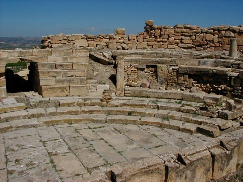 site antique ruines